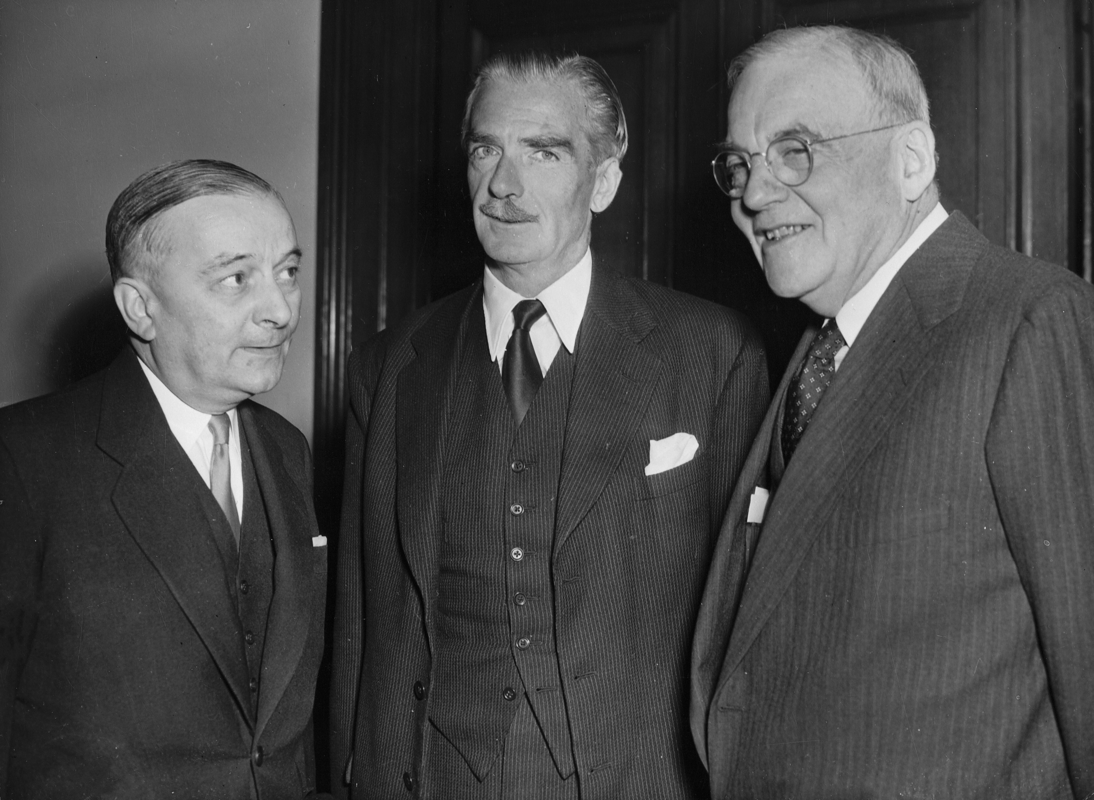 Georges Bidsult (l), Anthony Eden (midden) en John Foster Dulles